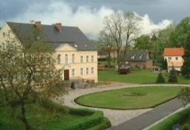 Rittergut Bomsdorf bei Neuzelle, Niederlausitz